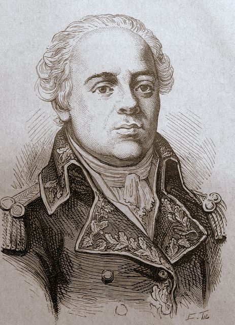 Der französische Revolutionsgeneral Jacques-François Menou (1750-1810)